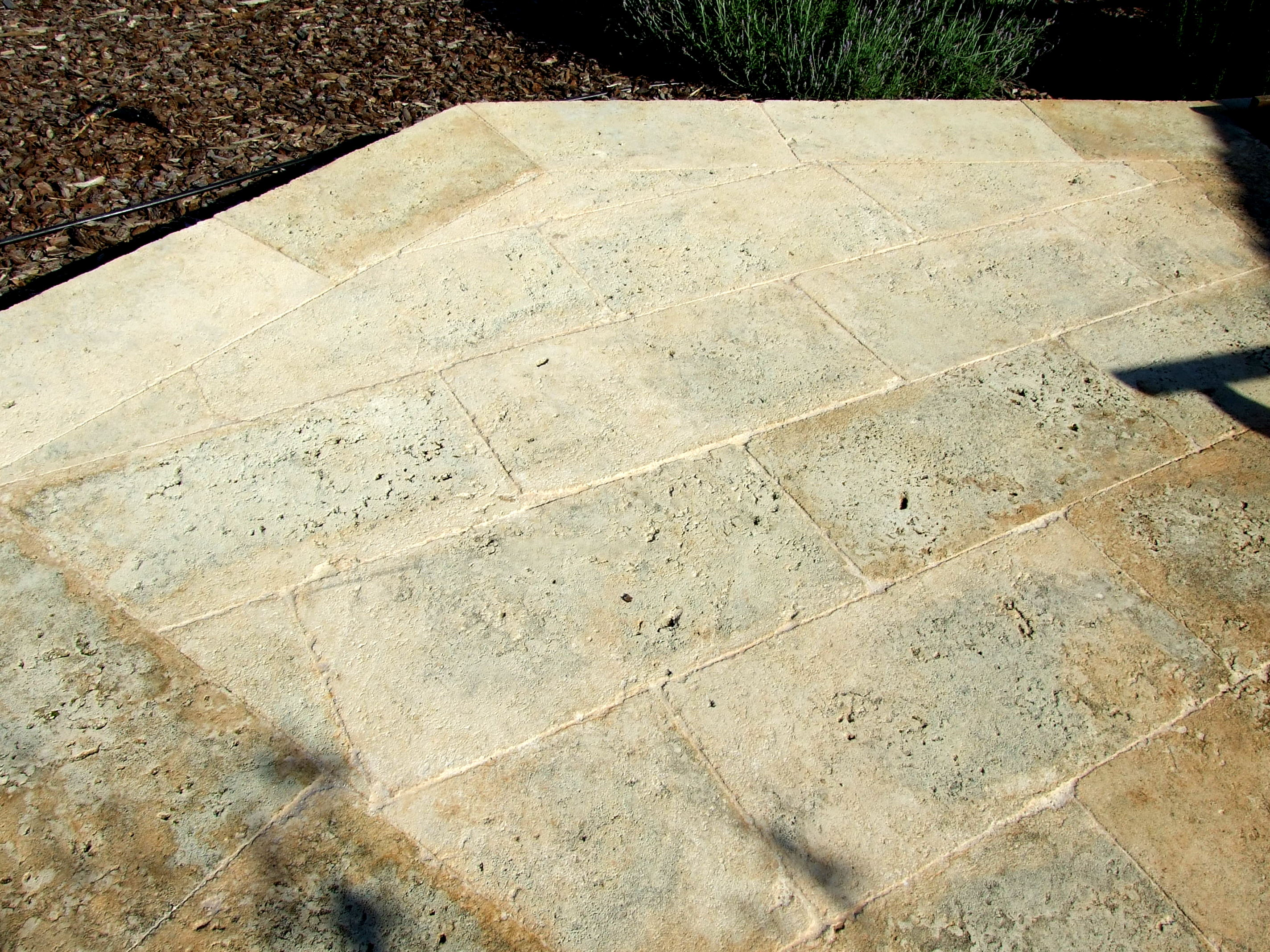 Bodenbelag aus Marès Blöcken